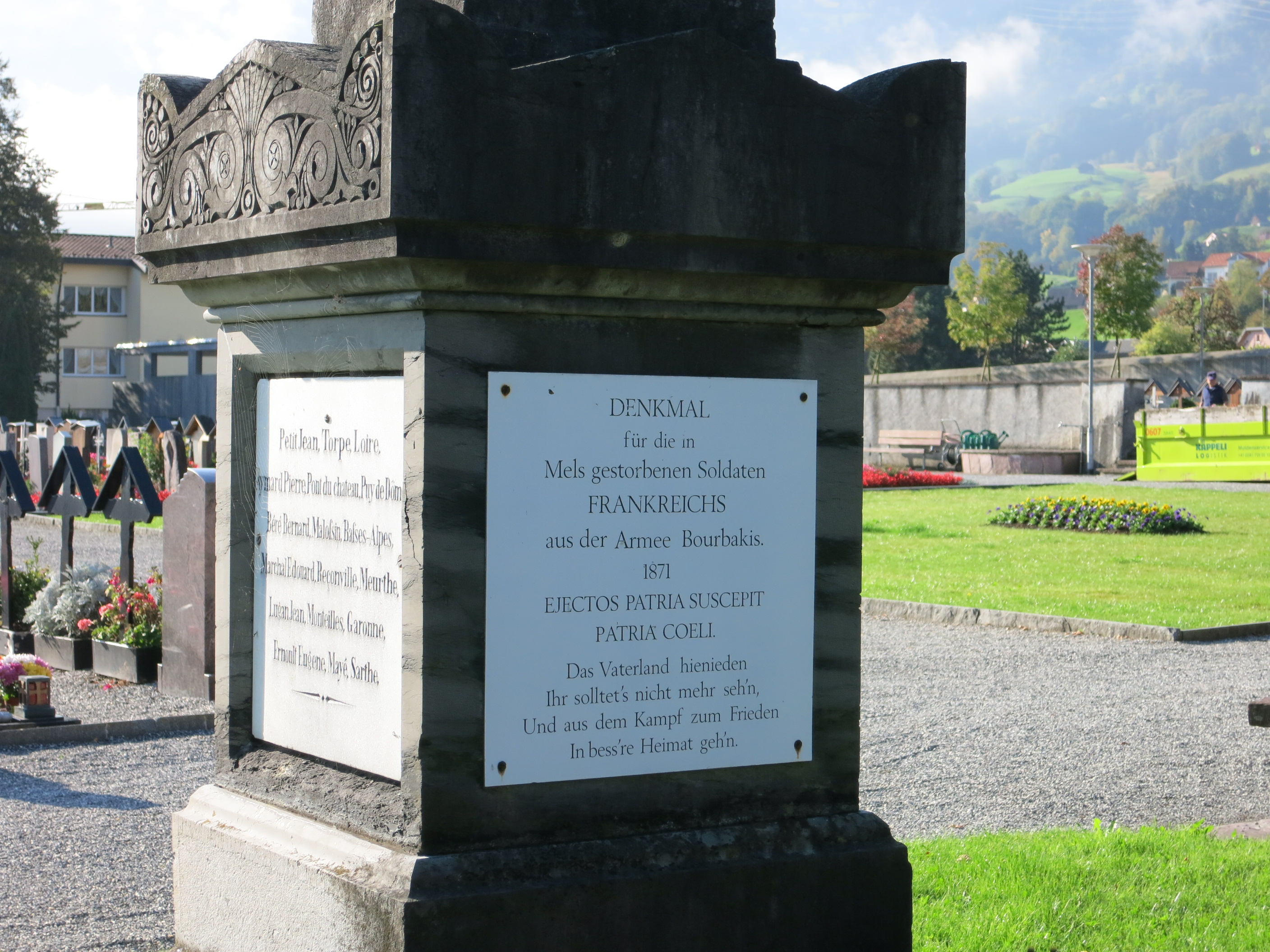 Bourbaki Gedenkstein, Mels SG, Schweiz